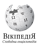 Wikipedia logo 2.0(rue)